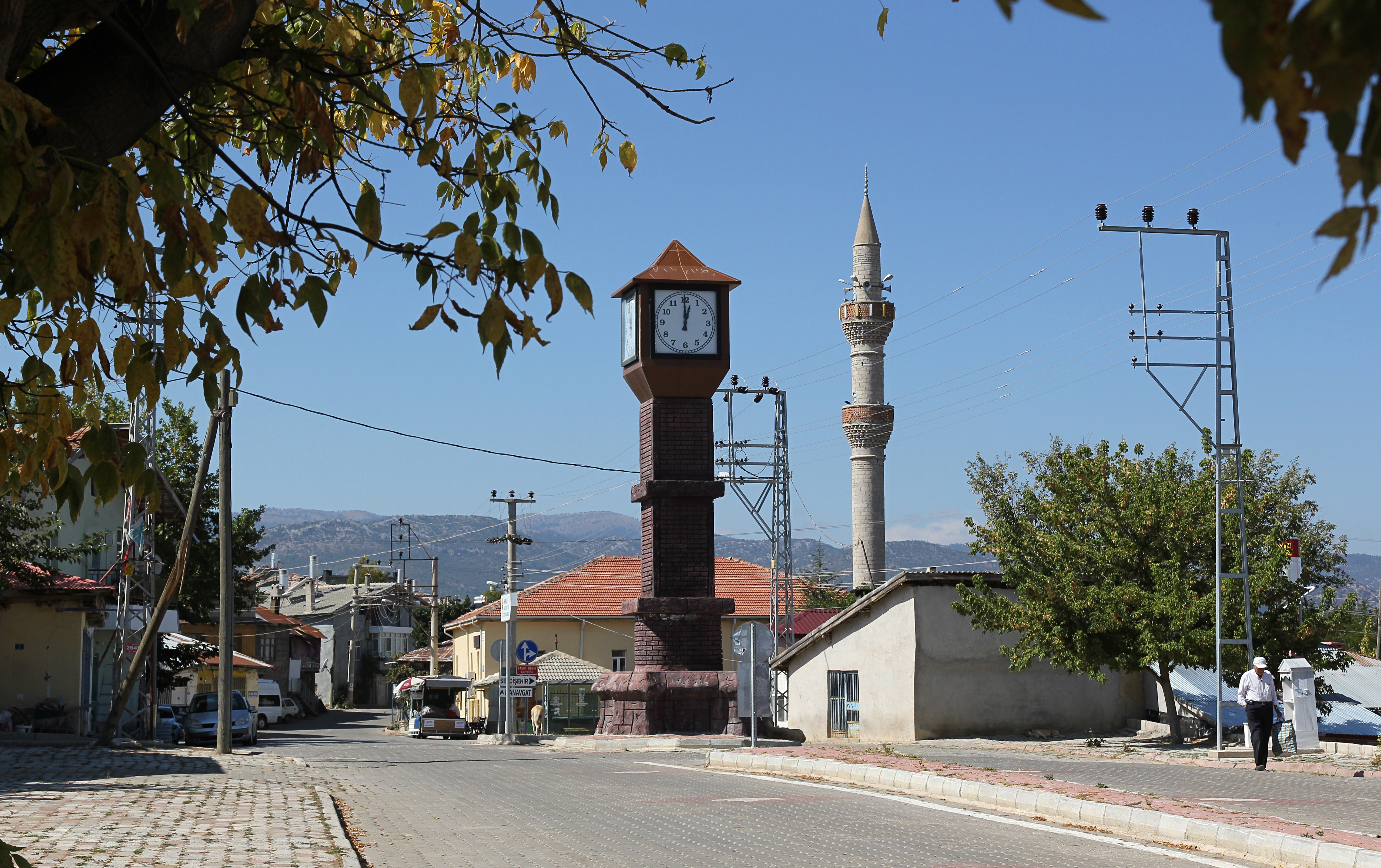 Ahırlı, Provinz Konya, Türkei, Uhrturm